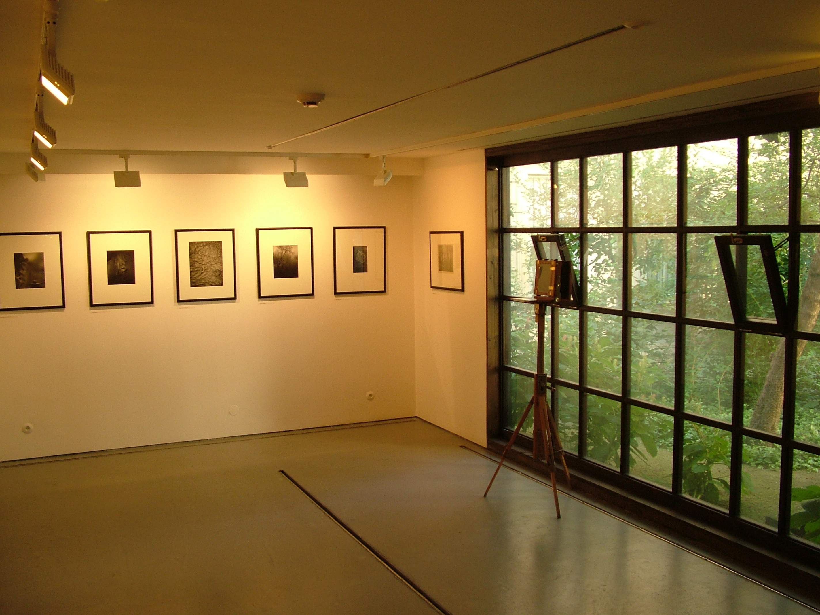 Výstava fotografií Josefa Sudka: Návraty Josefa Sudka, (kurátor Josef Moucha), PPF, Galerie Josefa Sudka, Ateliér v zahradě, Újezd 30, Praha 1, 2011